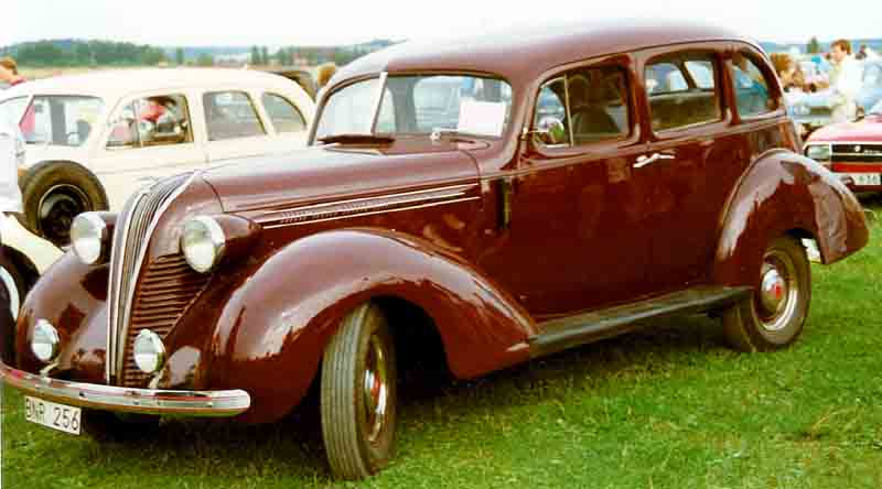 Terraplane Super 4-Door Sedan 1937